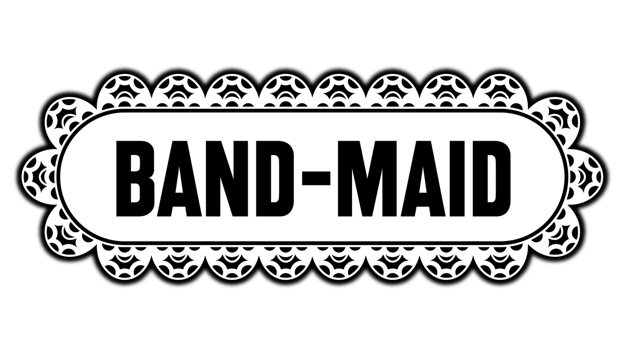 Logo Band-Maid (2014 - 2017)